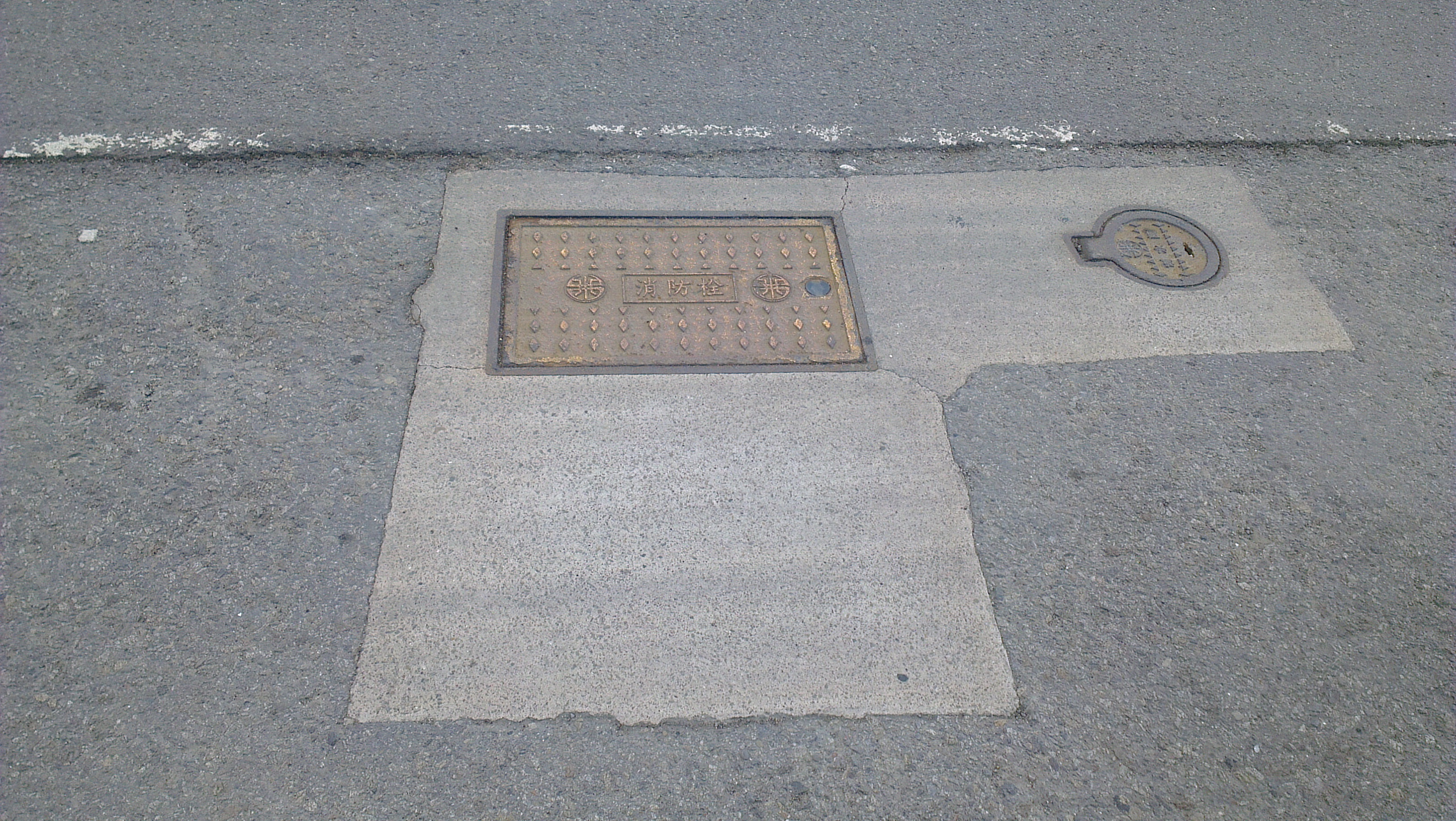 台灣自來水公司消防栓埋入道路之路面變成人孔蓋樣式，在蓋上漆為黃色。位於西濱公路。